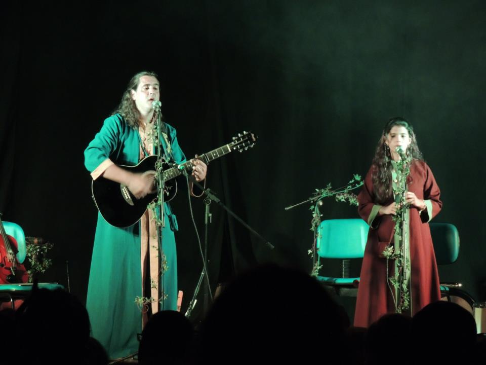 Concierto en Cosmópolis